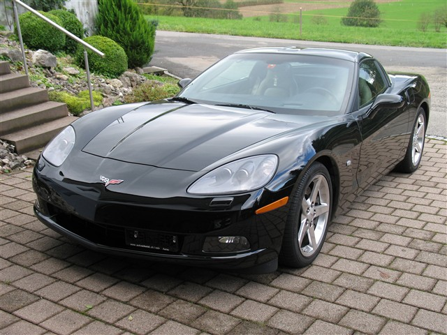 Corvette C6 Modell 2006. Motor: "LS2" 6.0 Liter V8. Getriebe: 6-Gang-Automatik mit "Paddle-Shift". Alles original